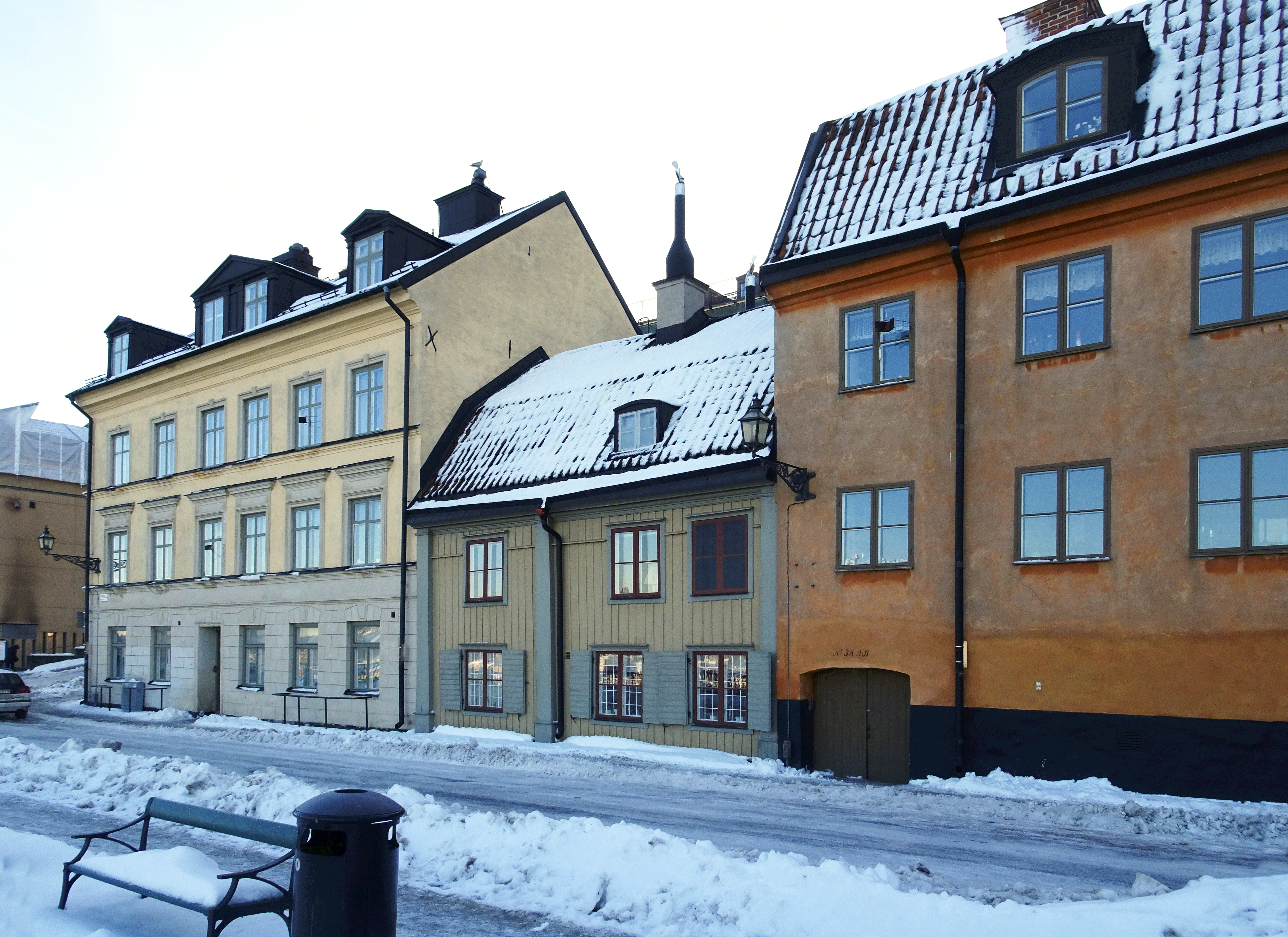 Fjällgatan 38A och B (närmast) samt 40